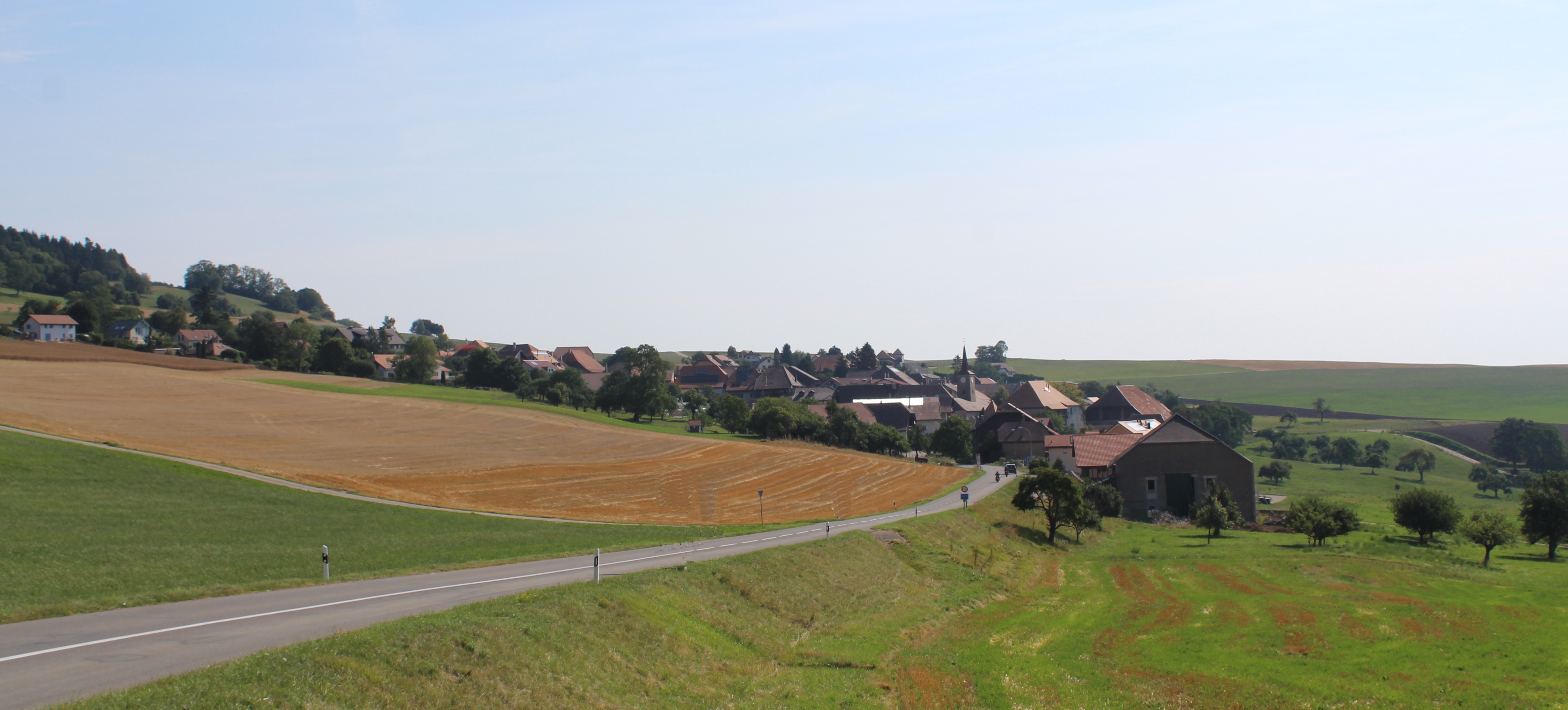 Panorama du village.